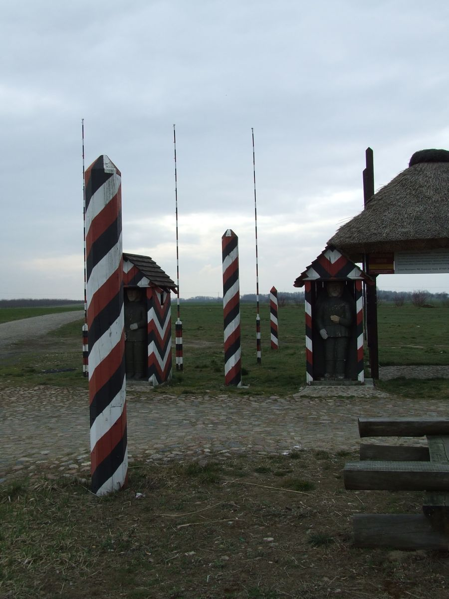 Borzykowo (województwo wielkopolskie), dawna granica między zaborami pruskim i rosyjskim